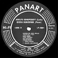 PANART